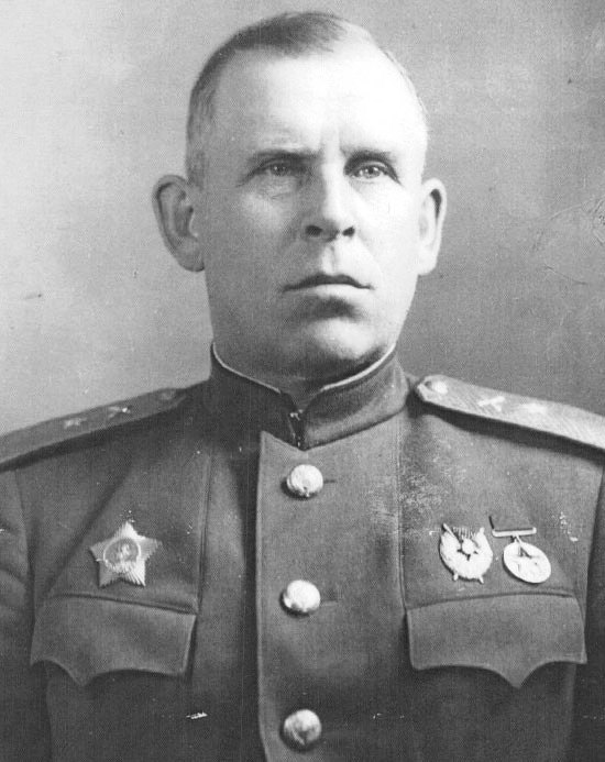 Генерал-майор Суслопаров Иван Алексеевич, военный атташе СССР во Франции